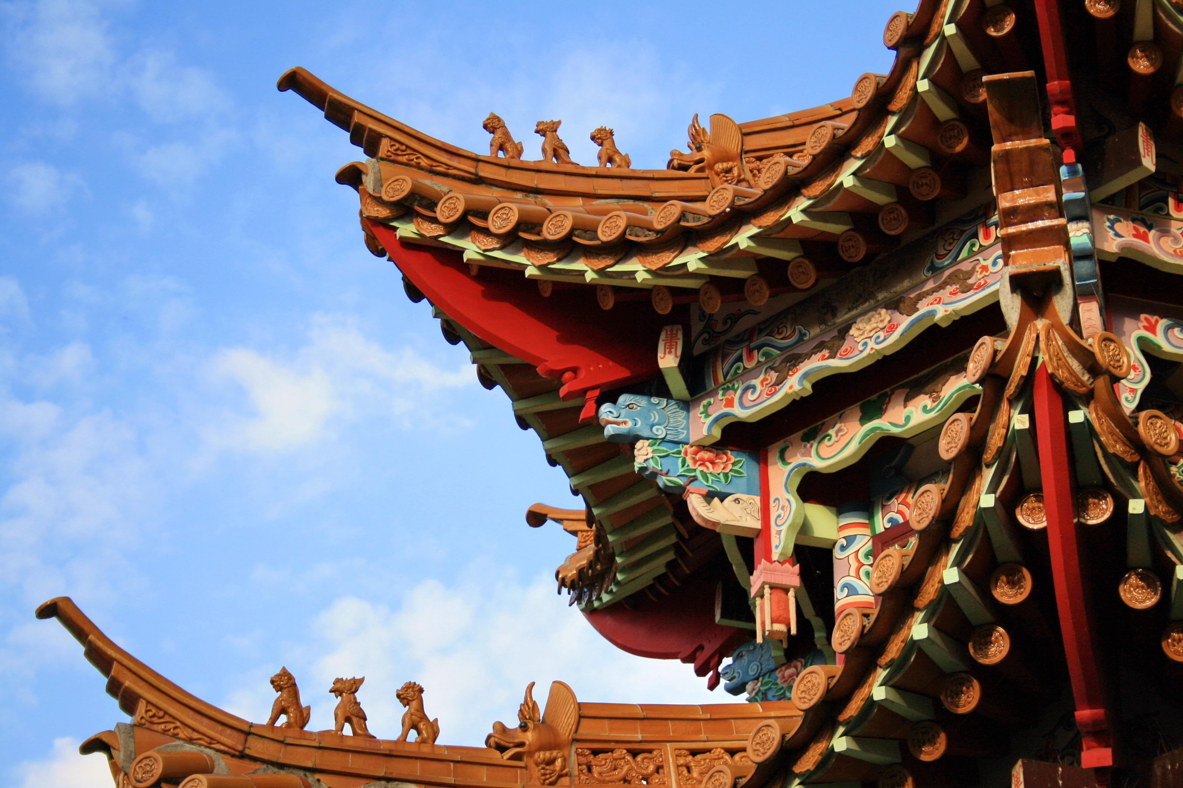 Corner pavilion in Chinagarten Zürich (Switzerland)